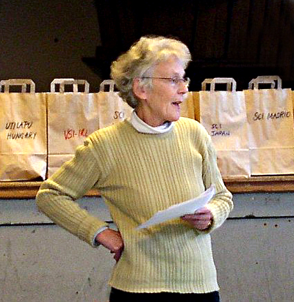 Anni Lanz anlässlich einer Rede am 65. International Committee Meeting des Service Civil International